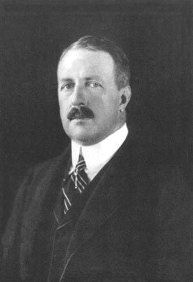 Pedro de Alcântara de Orléans e Bragança (1875-1940)